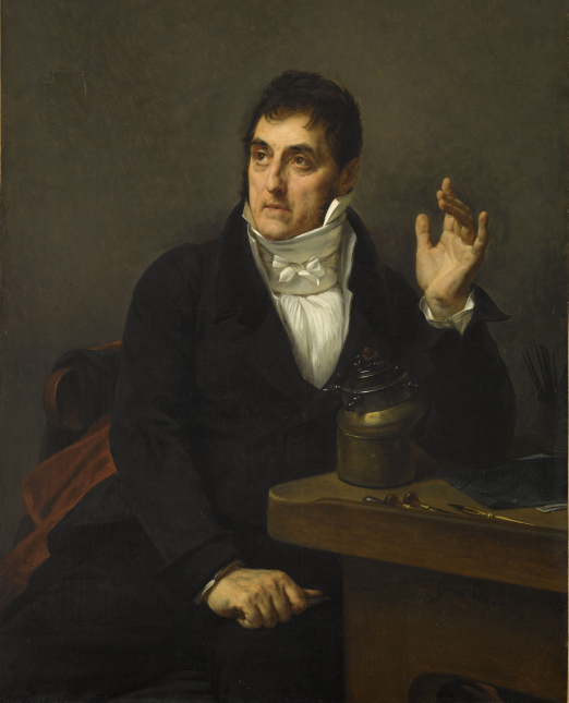 il grave la médaille frappée en l'honneur du peintre Jacques-Louis David et portée au modèle à Bruxelles par Gros en 1822